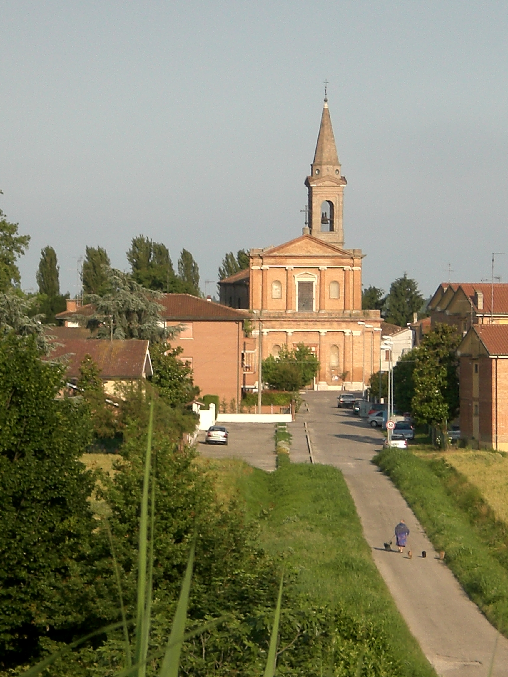 Francolino, frazione di Ferrara: la chiesa parrocchiale di San Marco Evangelista.